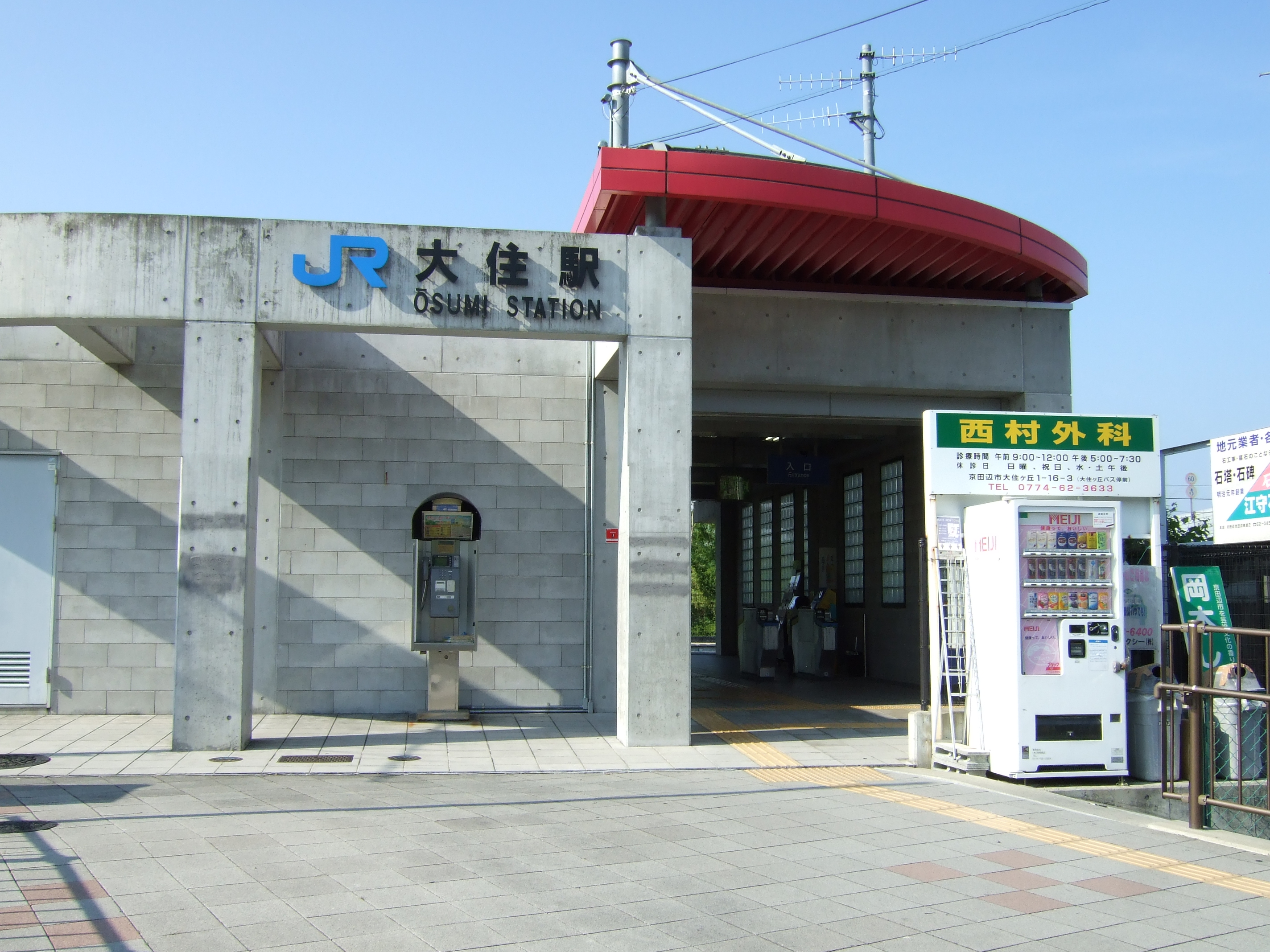 大住駅駅舎です。